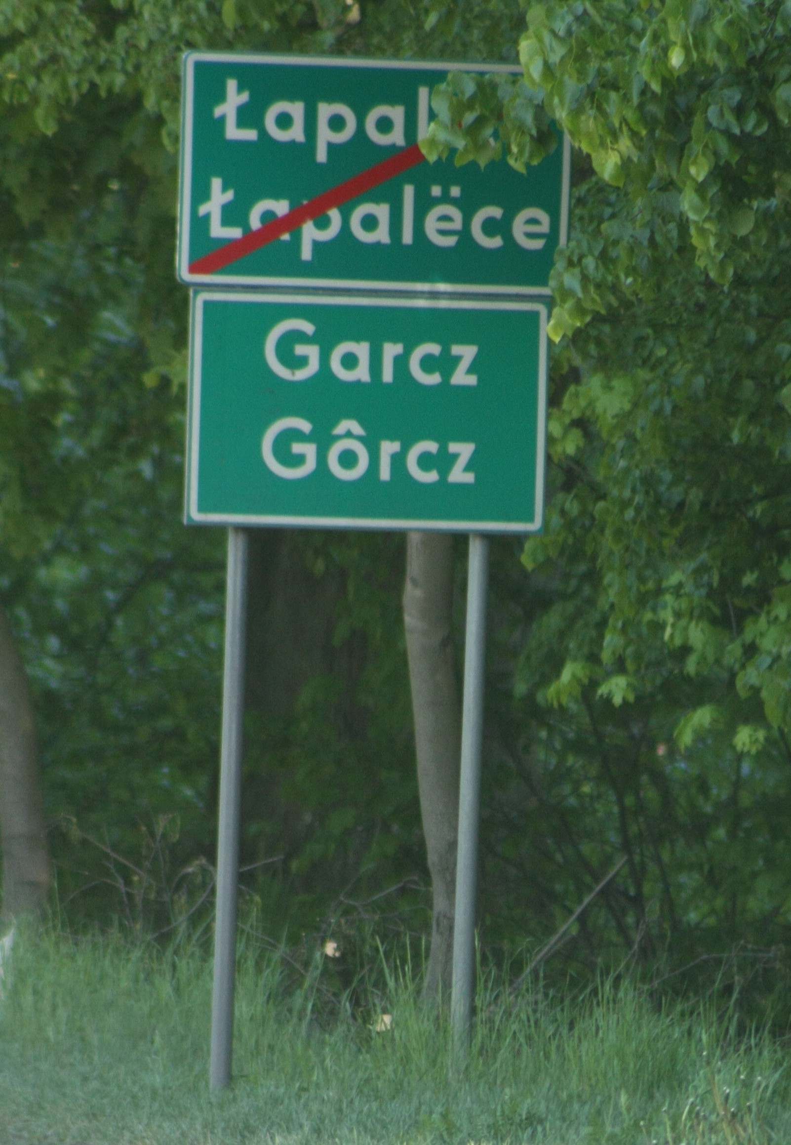 Dwujęzyczna tablica z nazwą przed wjazdem do wsi Garcz